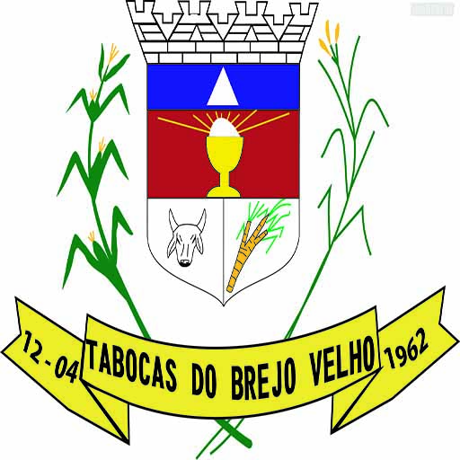 Bahia